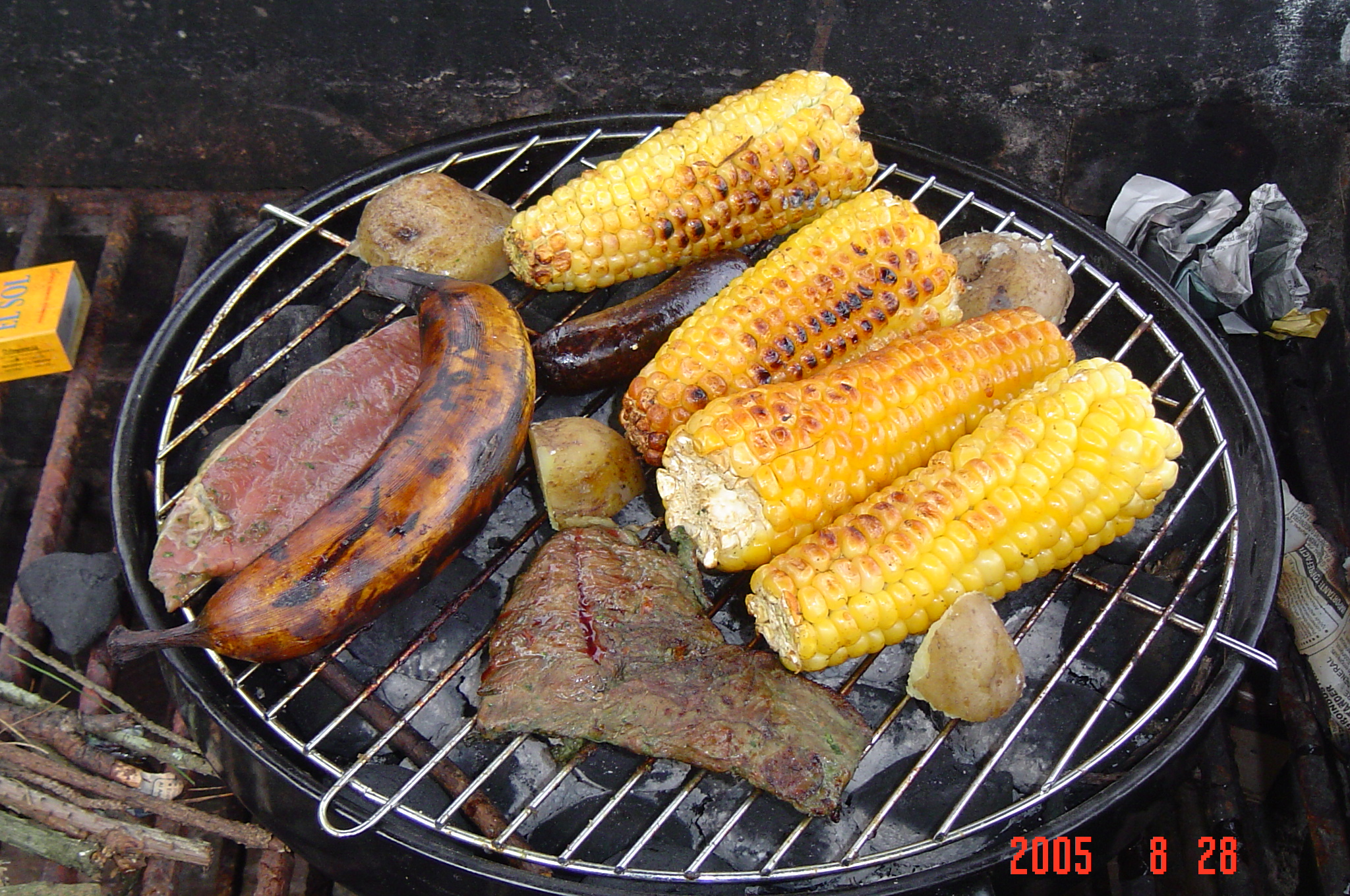 Asado bogotano, con mazorca, carne y maduro.